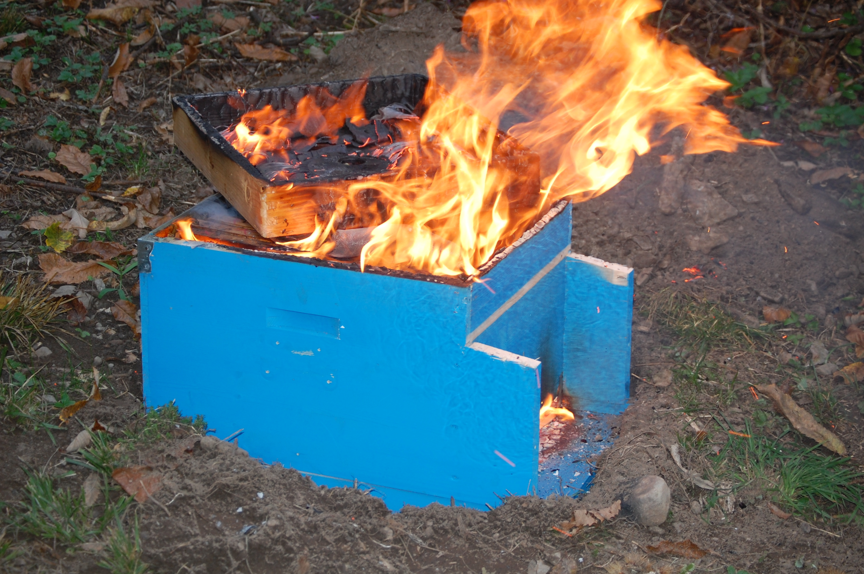 Bruciatura di arnia affetta da Peste americana